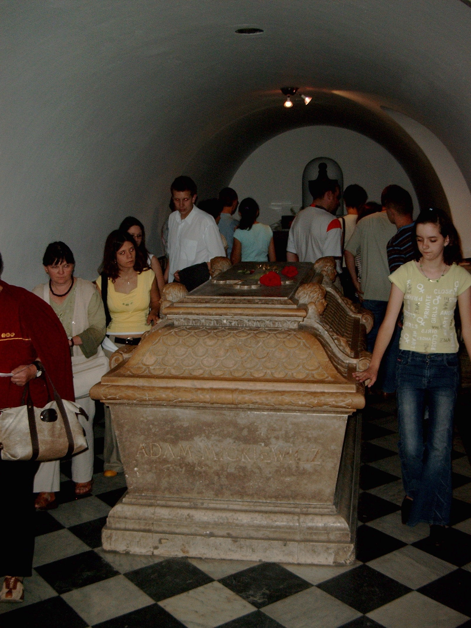 Grobowiec Adama Mickiewicza w krypcie w katedrze na Wawelu